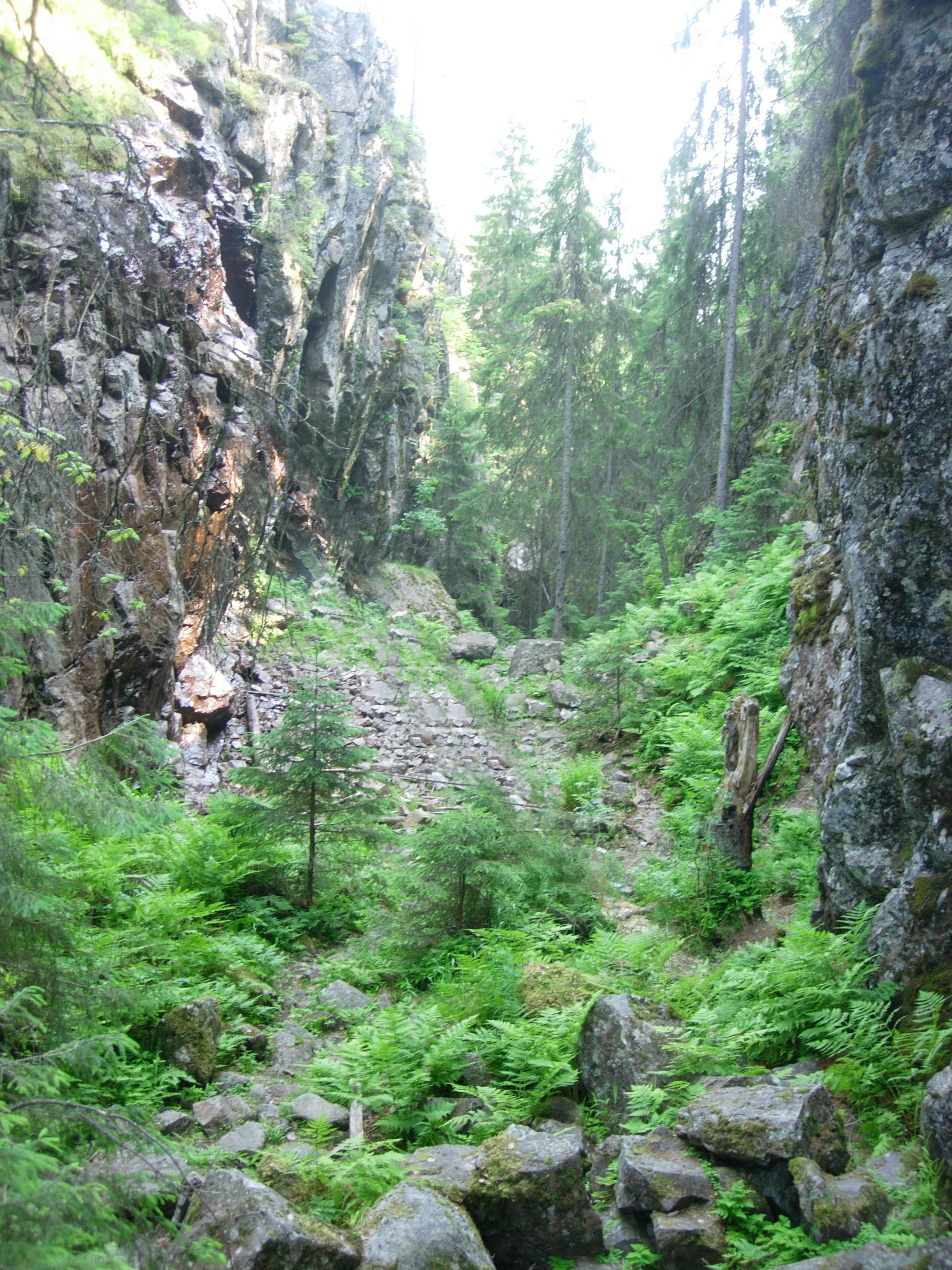 Hitonhaudan luonnonsuojelualue